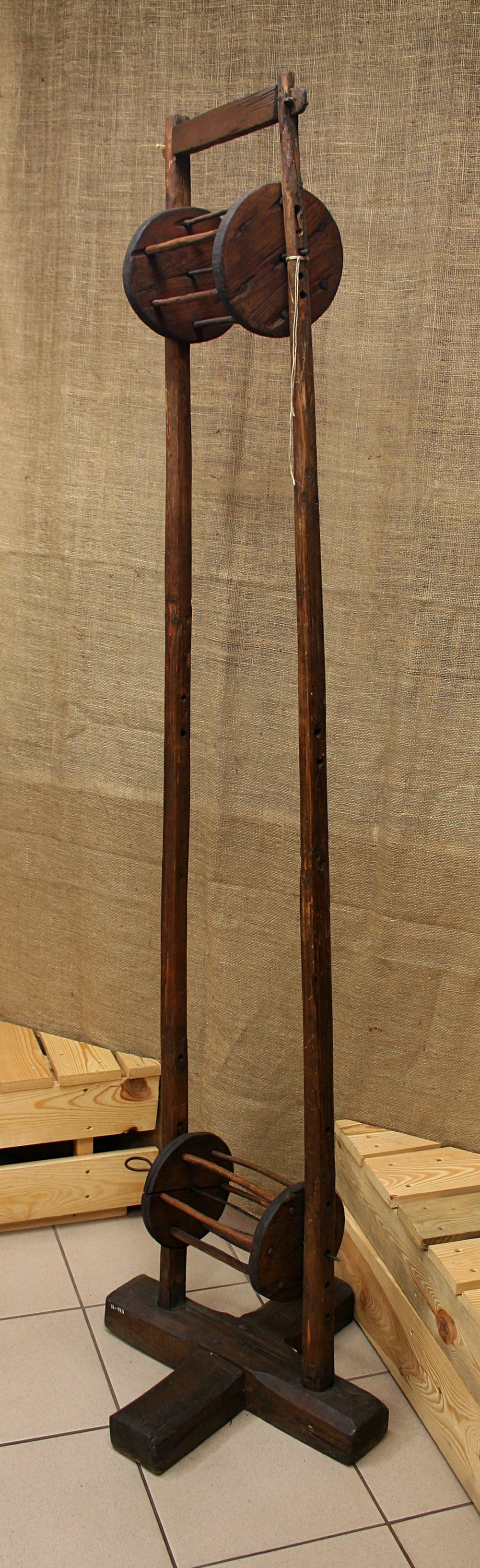 Motowidło, wystawa w Muzeum Częstochowskim